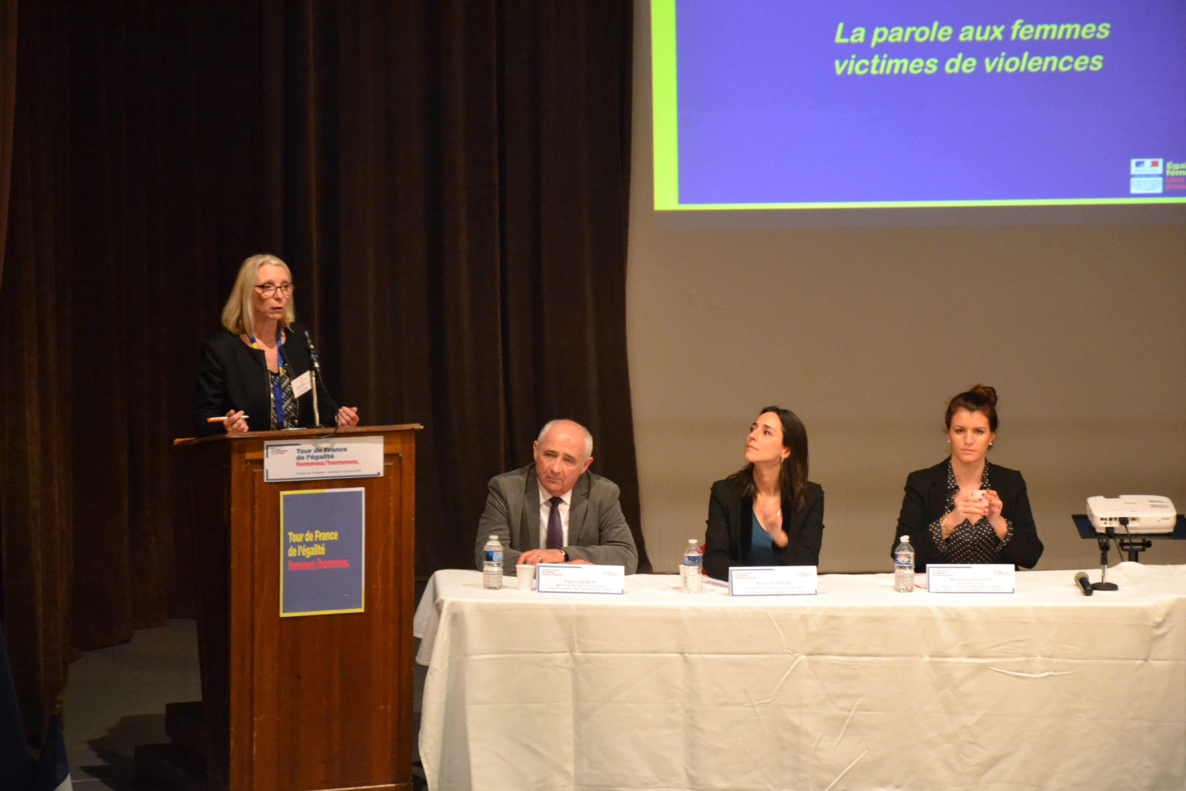 Ateliers du Tour de France de l'égalité femmes-hommes à Pernes les Fontaines, le 12 janvier 2018